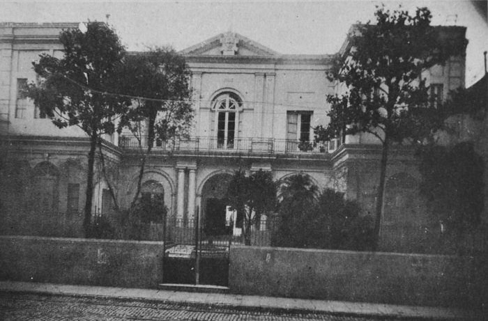 Fachada del edificio de la Escuela de Medicina de la Universidad de Buenos Aires, construido en 1858 por el arquitecto Pierre Benoit. En 1926 fue remodelado totalmente por el arq. Gelly Cantilo en estilo neocolonial y hoy funciona como Escuela Primaria "Guillermo Rawson" en la calle Humberto 1° 343, Buenos Aires.